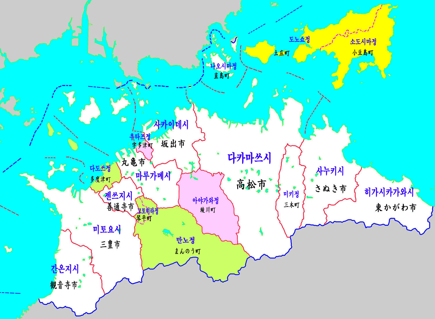 가가와현 행정구역